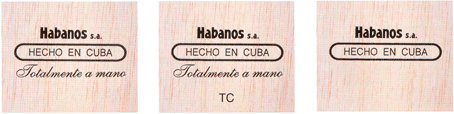 Sigle présent sur le fond des boîte de Habanos (cigares cubains)